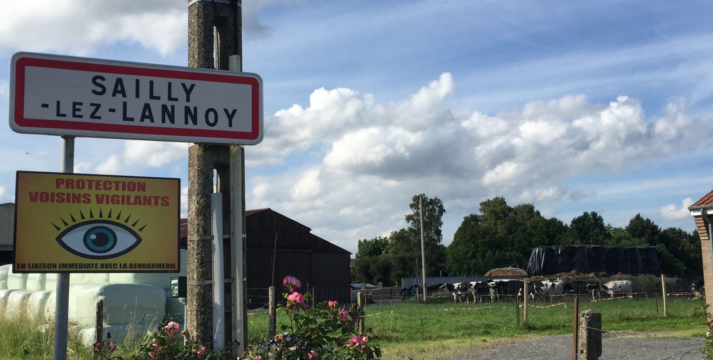 Sailly-Lez-Lannoy 59390 Entrée de commune